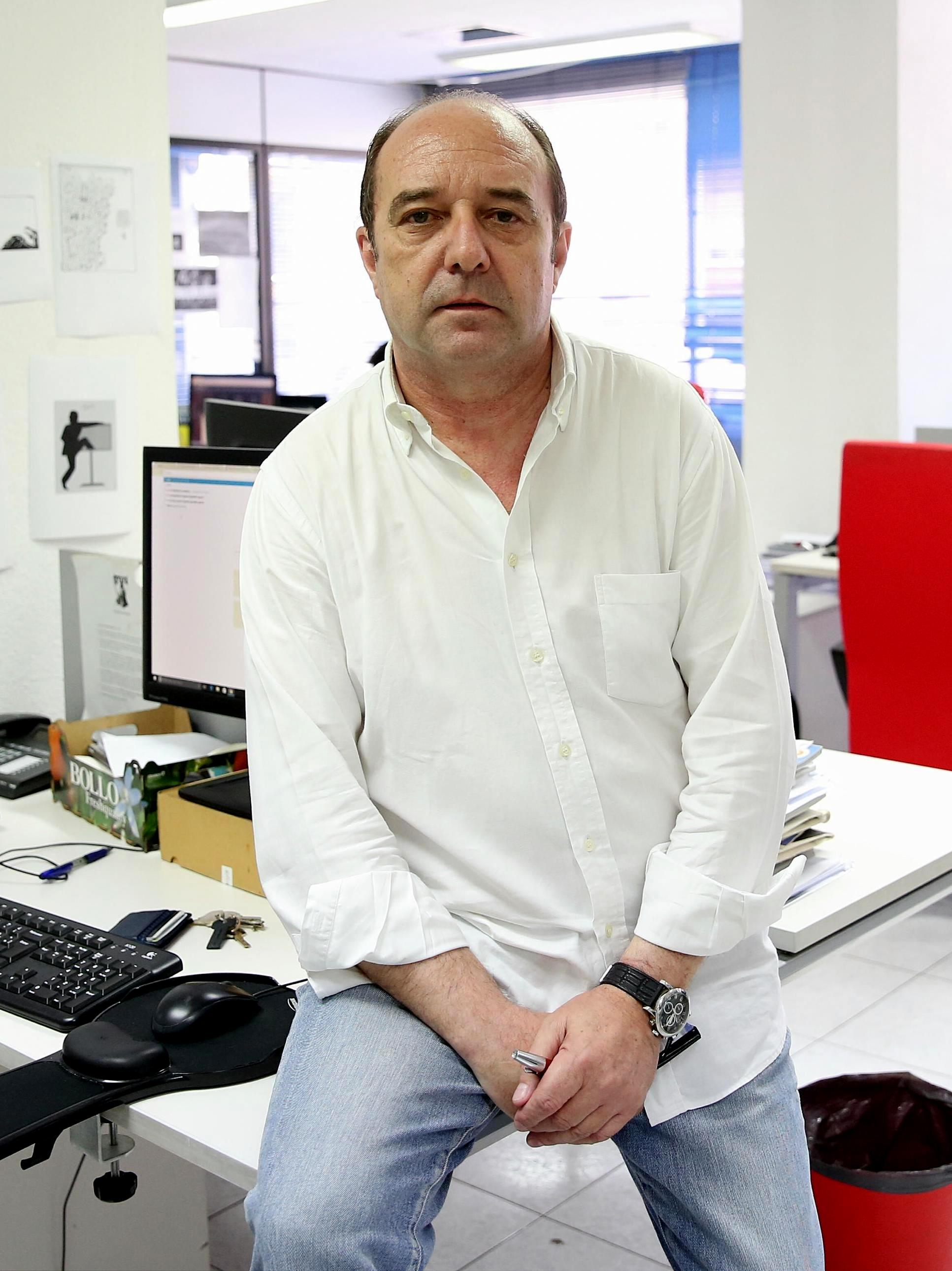 “Es muy difícil que cambie el Gobierno del PP si no hay algún tipo de entendimiento colaborativo entre el PSOE y Podemos”, dice el periodista Jesús Maraña. “En el Congreso del PSOE en Sevilla no hubo renovación generacional sino un blindaje de la vieja guardia, de los modos institucionales y pactistas eternizados desde la Transición”. “Ciudadanos es una cuña de los poderes económico-financieros, que no ocultan que quieren que haga el papel de frenar a Podemos, que evite cualquier posibilidad de que Podemos participe o apoye un gobierno de izquierda”